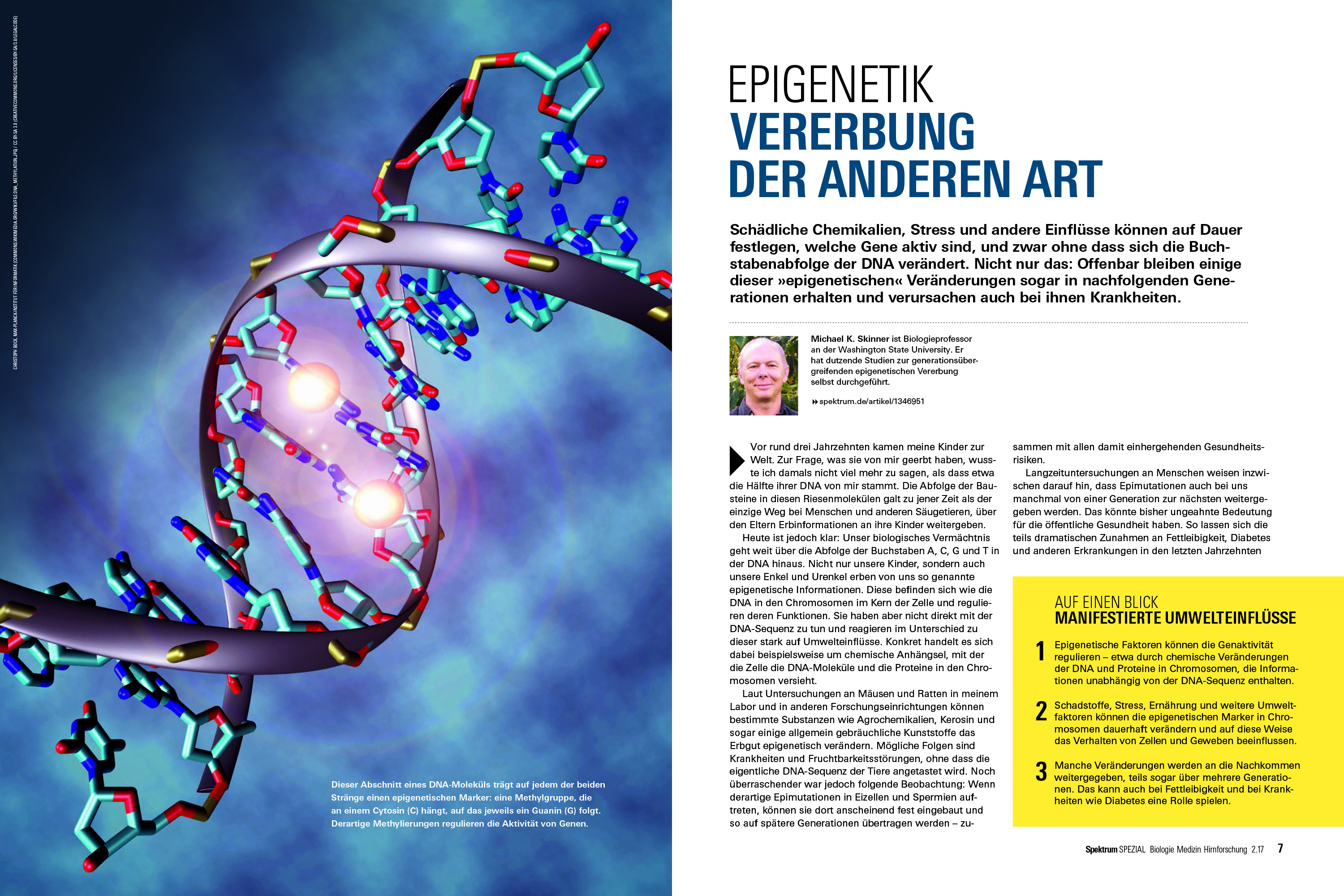 Typischer Aufmacher eines populärwissenschaftlichen Artikels – hier aus "Spektrum der Wissenschaft" SPEZIAL Biologie-Medizin-Hirnforschung 2.17, S.6/7.